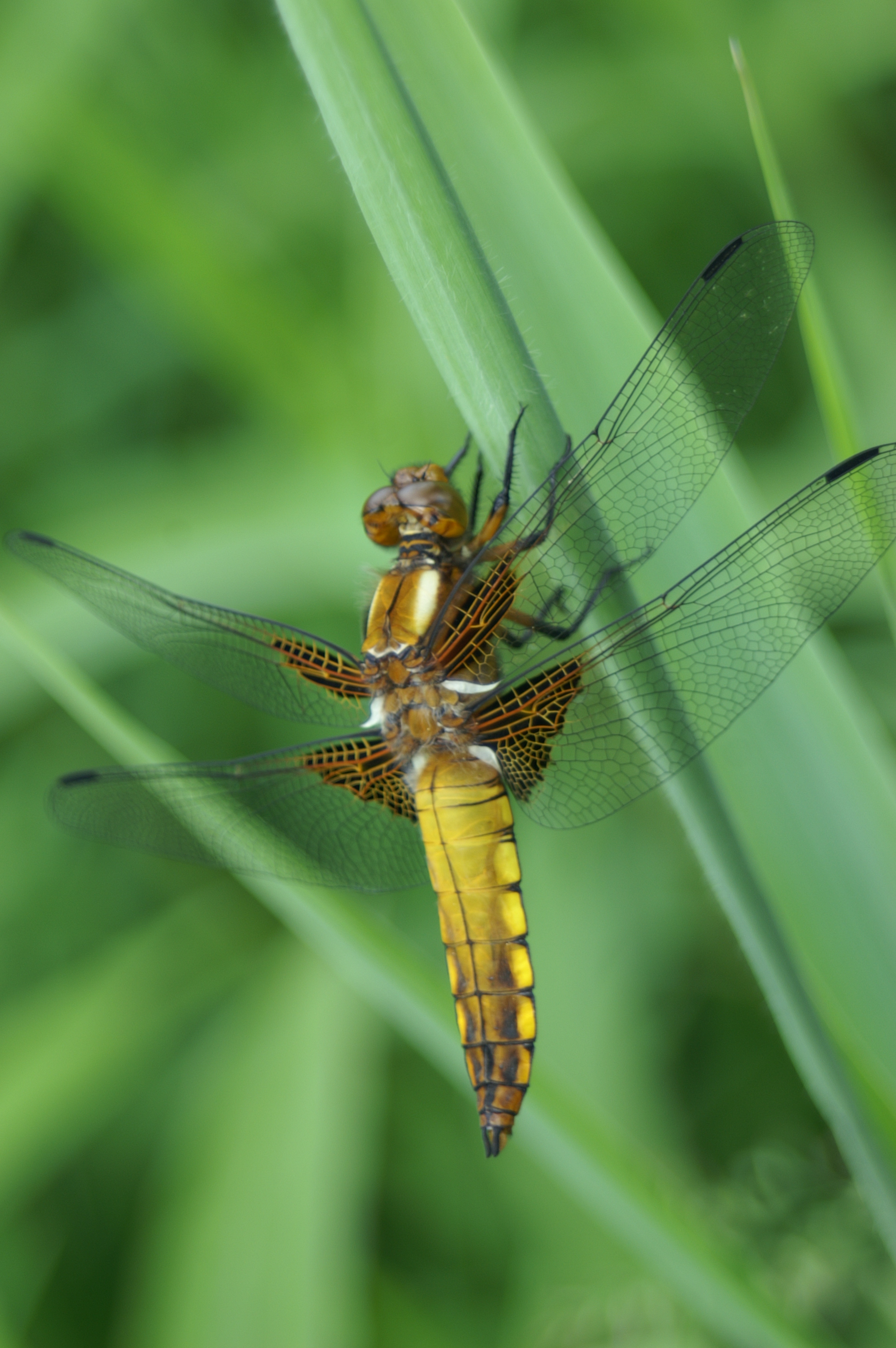 weiblicher Plattbauch. Der Plattbauch (Libellula depressa) ist eine der schönsten und auffälligsten Libellen Mitteleuropas.